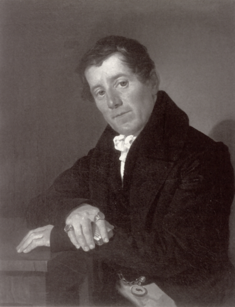 Self-portrait